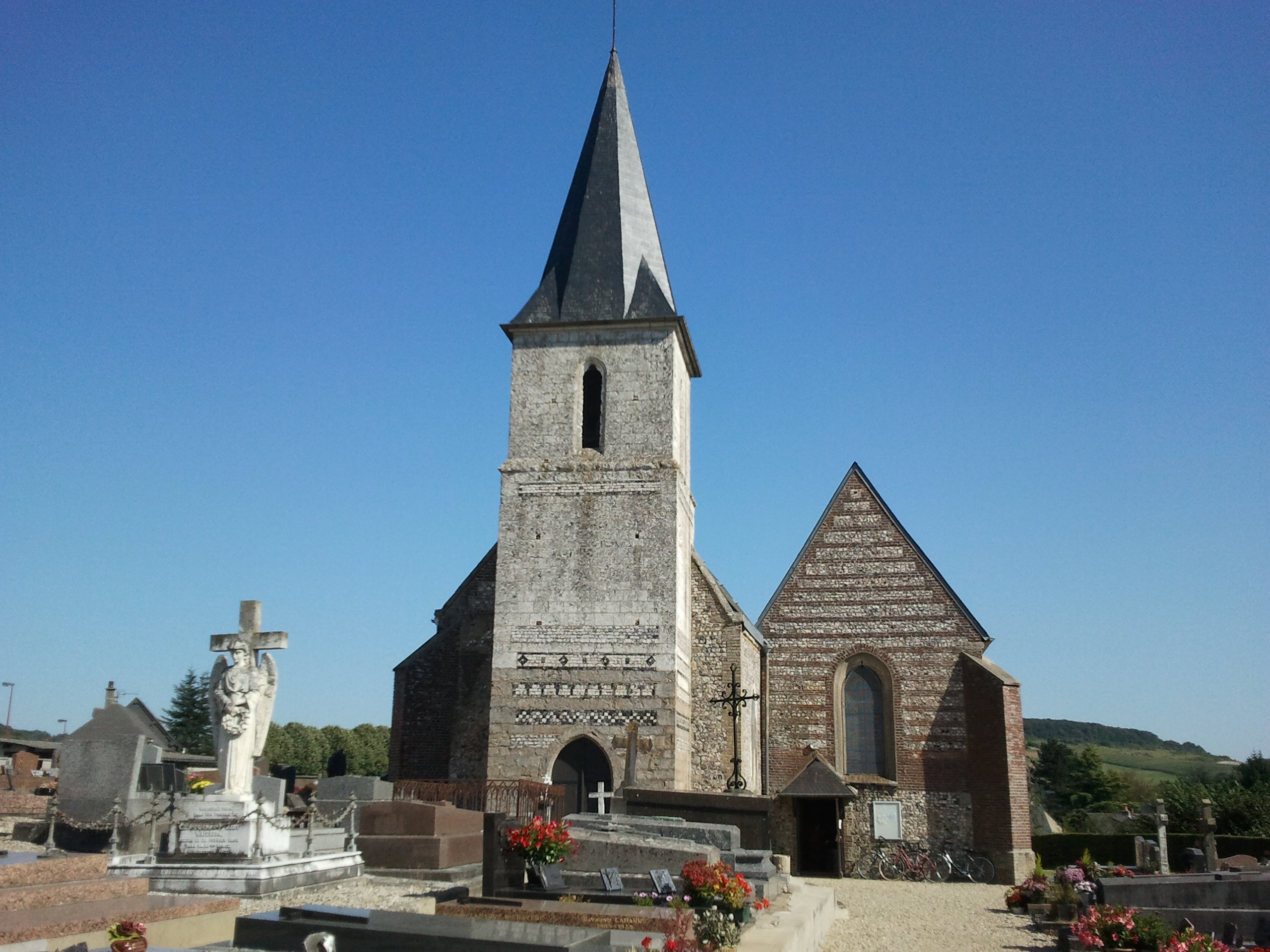 l'église